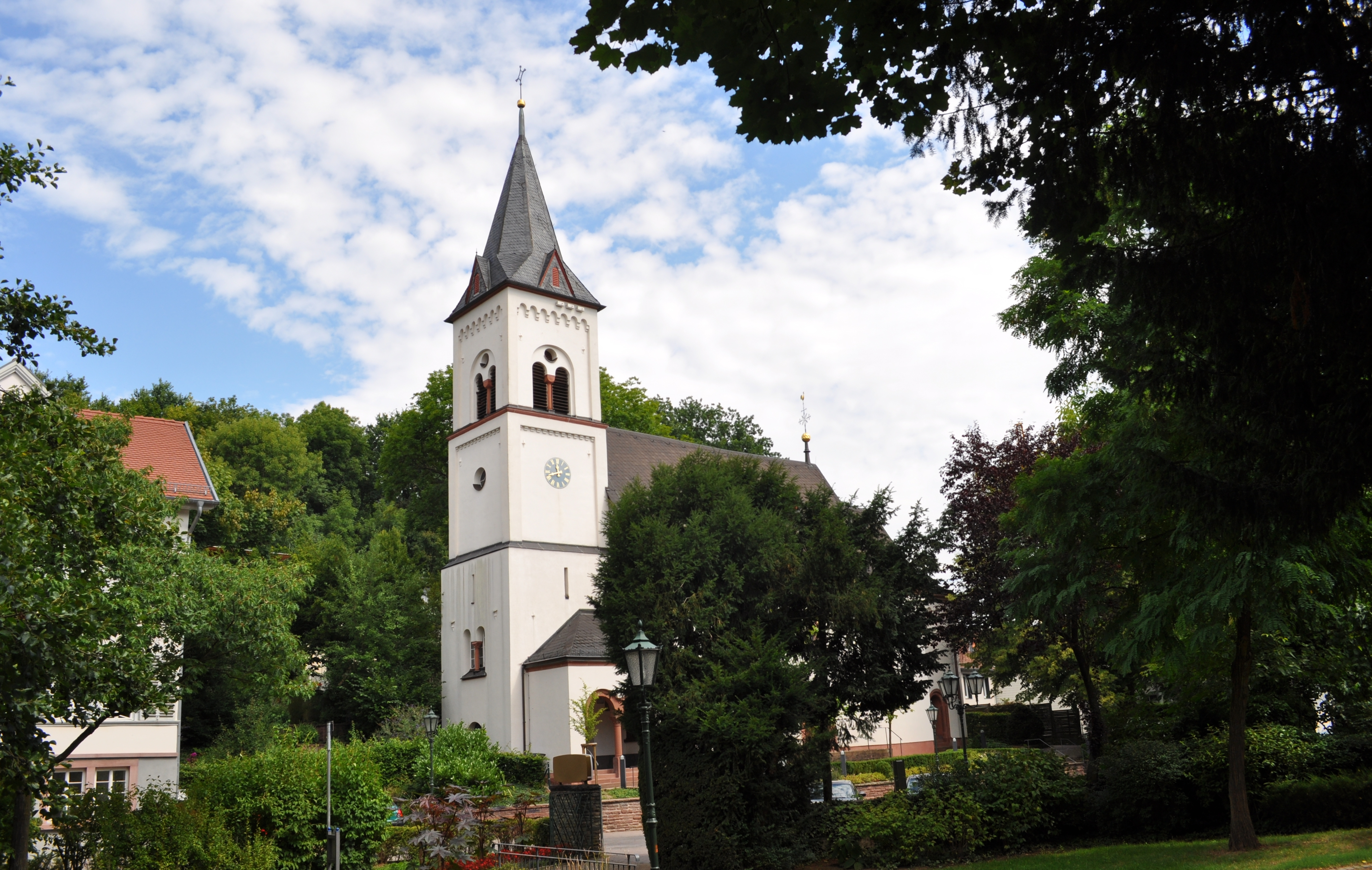 Evangelische Kirche in Bad Soden